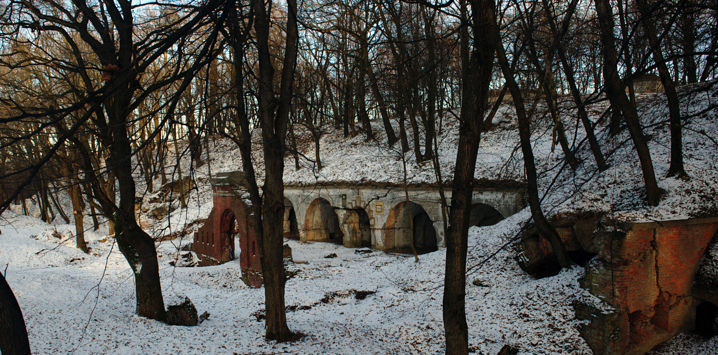 Fort I Salis-Soglio w obrębie Twierdzy Przemyśl